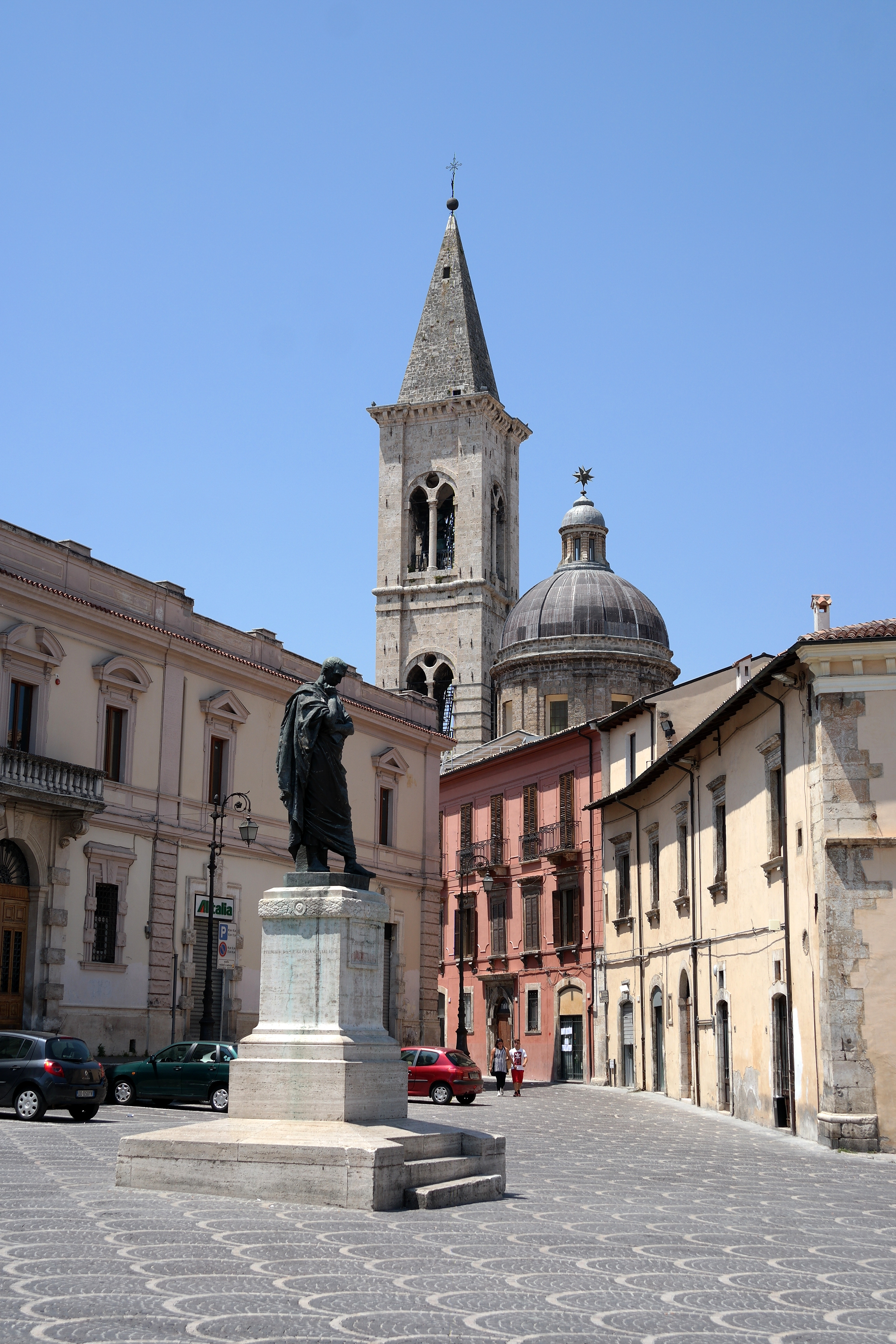 Piazza XX Settembre, Statua di Ovidio e campanile e cupola della Chiesa della Santissima Annunziata